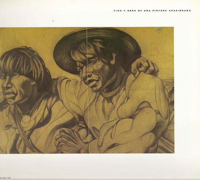 Pictografía de Emilia Ortiz